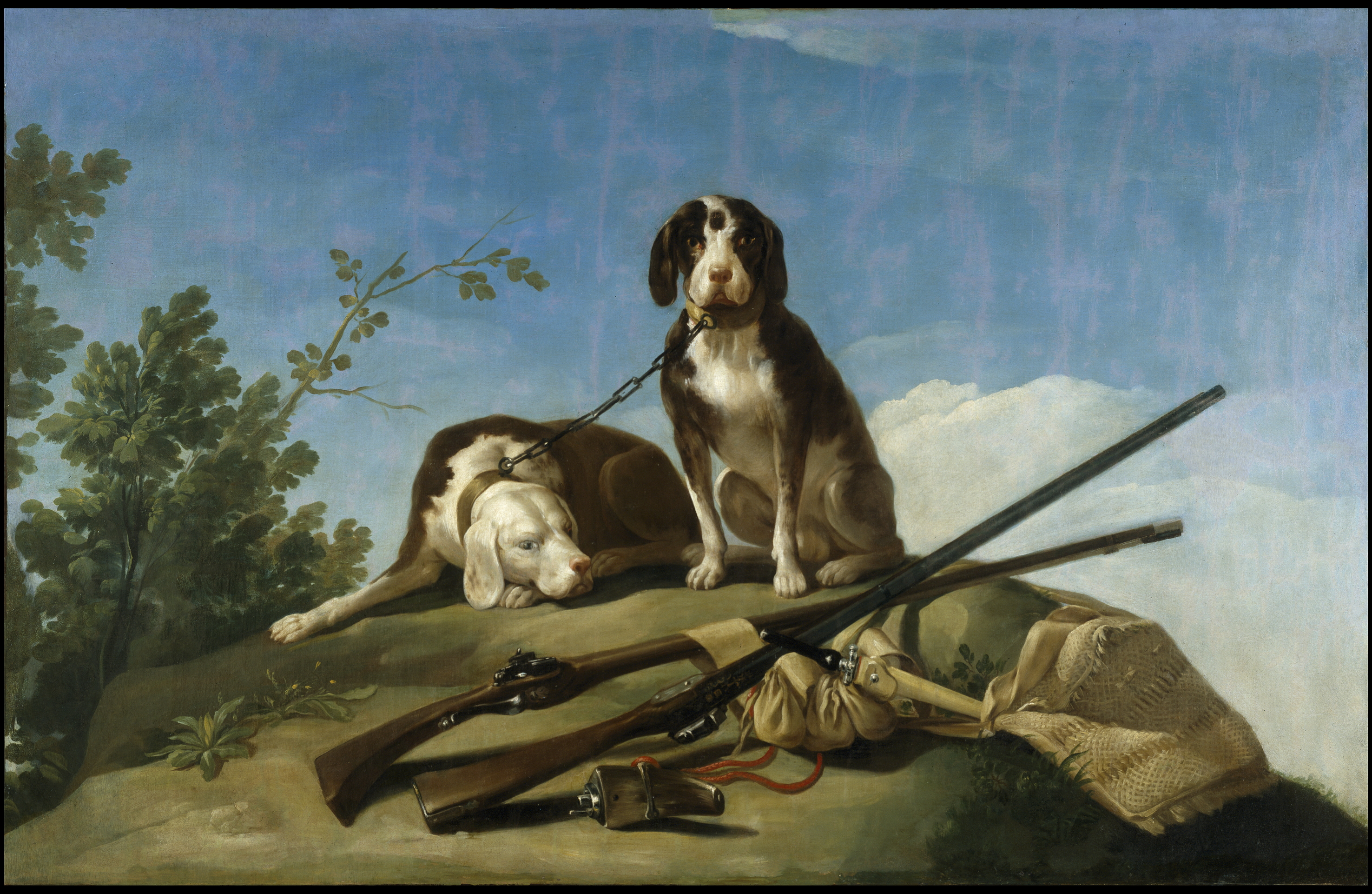 Perros en traílla.title QS:P1476,es:"Perros en traílla." label QS:Les,"Perros en traílla."